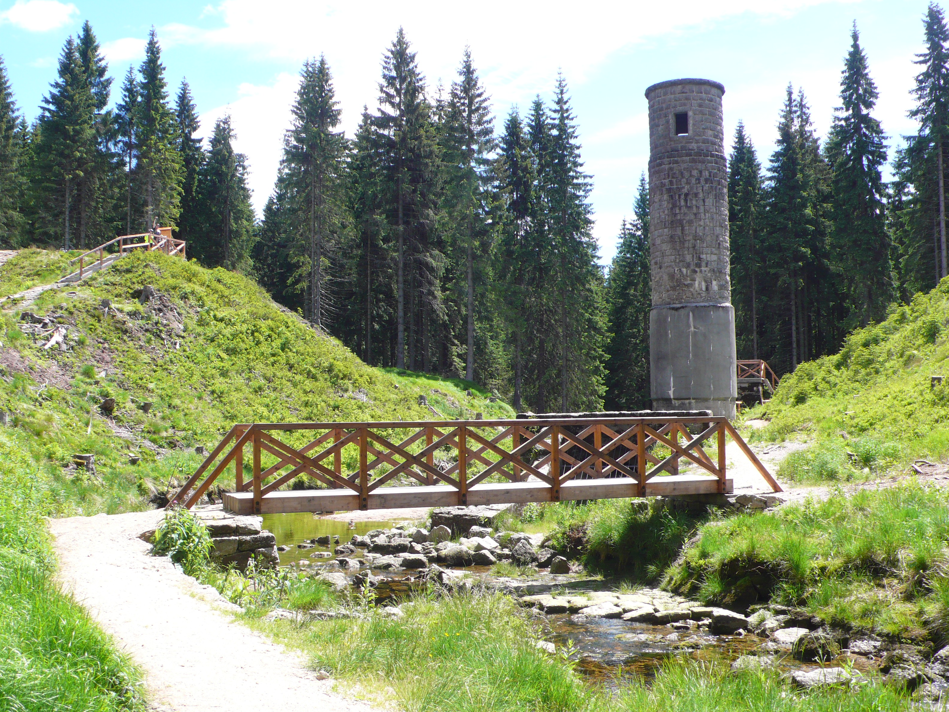 Protržená přehrada v Desné (2016)